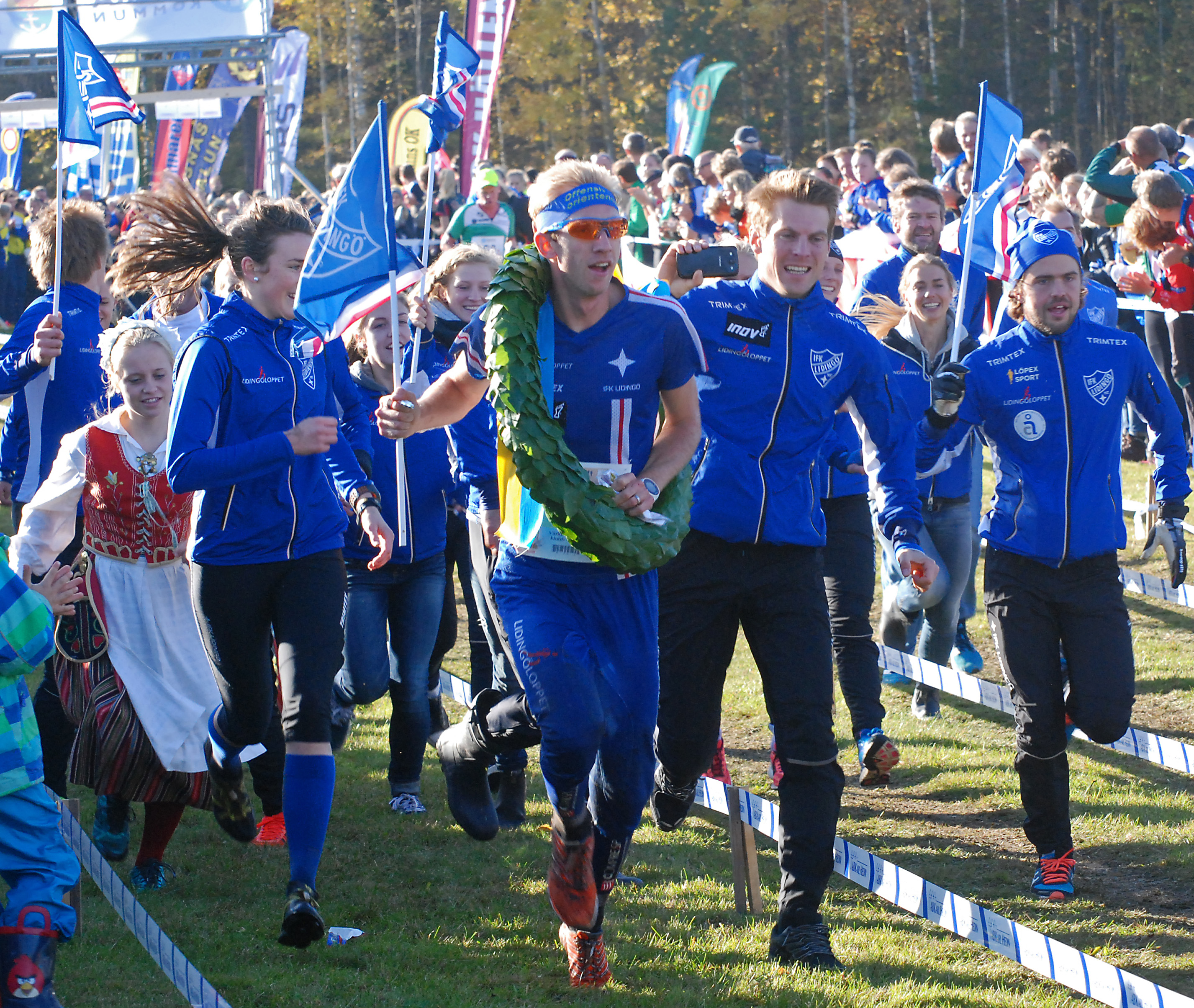 IFK Lidingö, segrarlaget i 25-manna 2014 vid Rudan, på upploppet